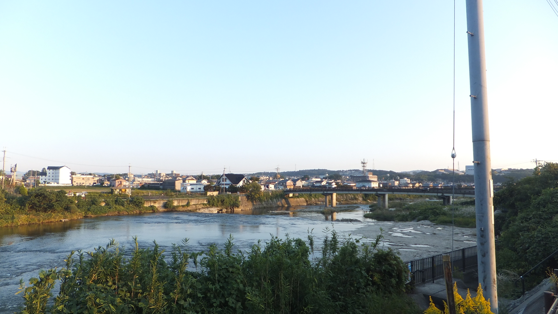 兵庫県三木市府内 美嚢川